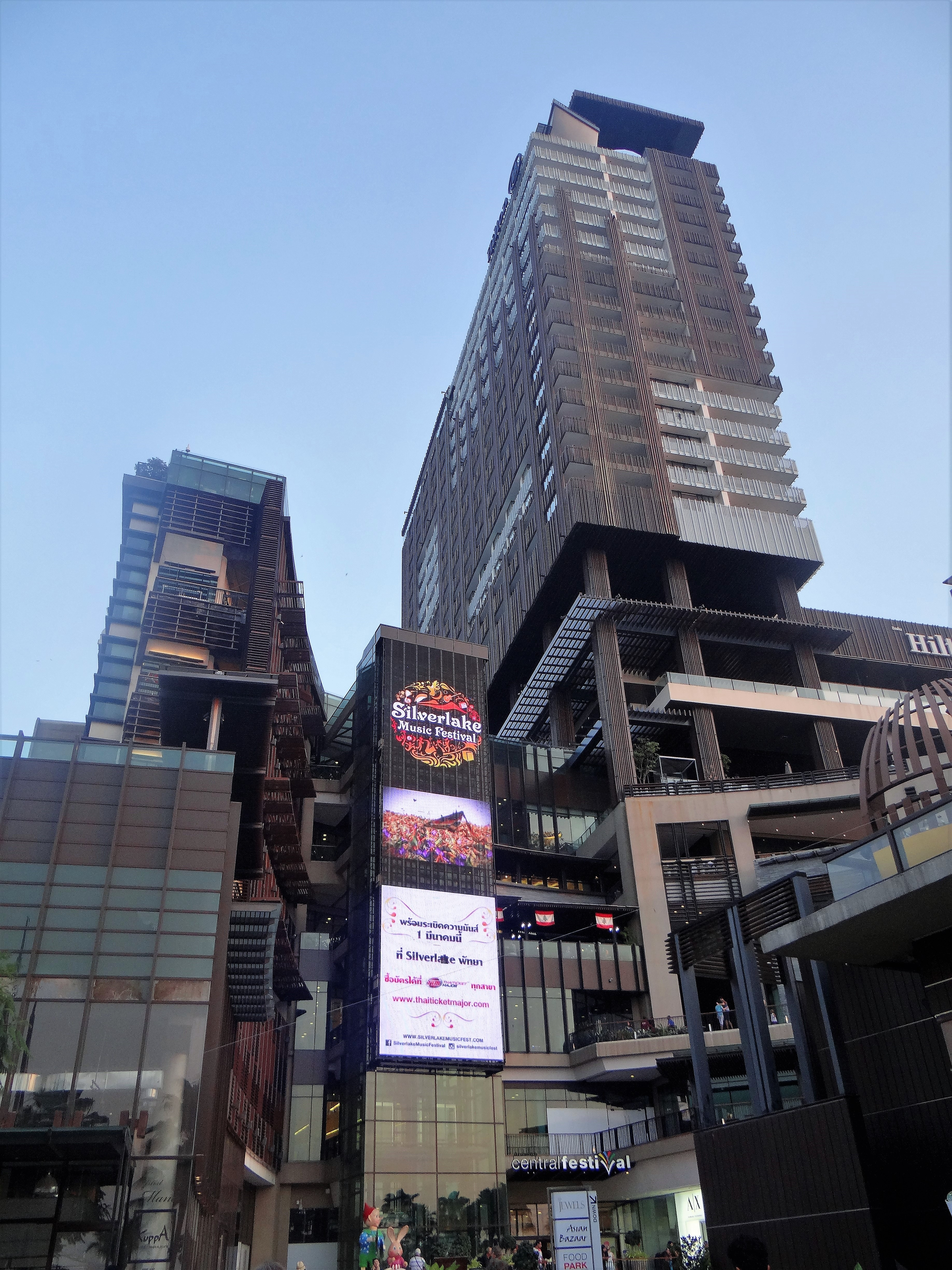 Hôtel Hilton, Pattaya, ThaÏlande